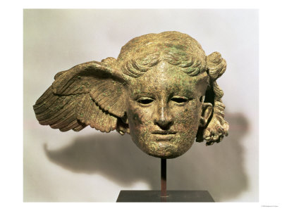 sculpture en bronze du IVème siècle